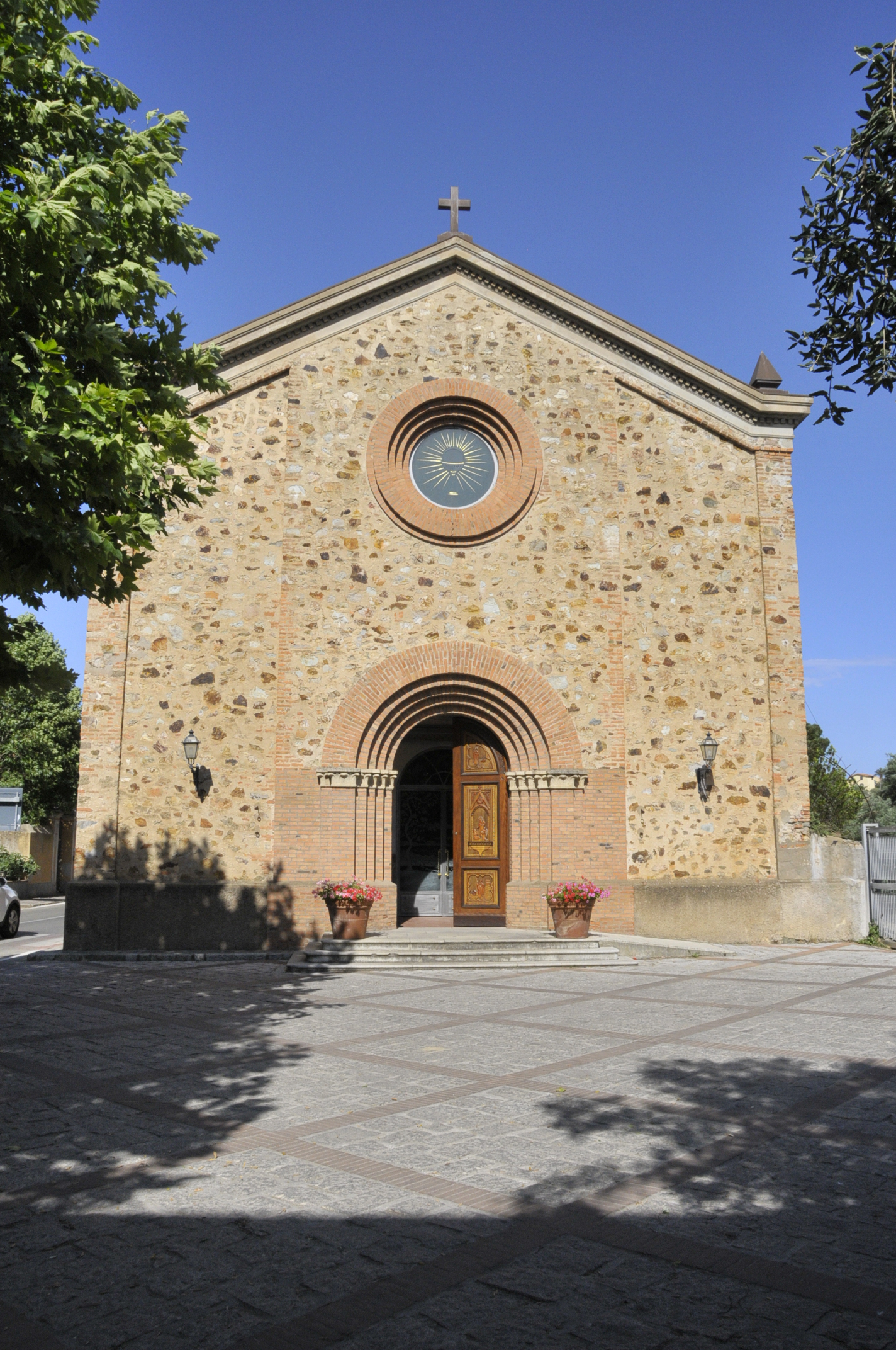 Rio Marina, Santa-Barbara-Kirche